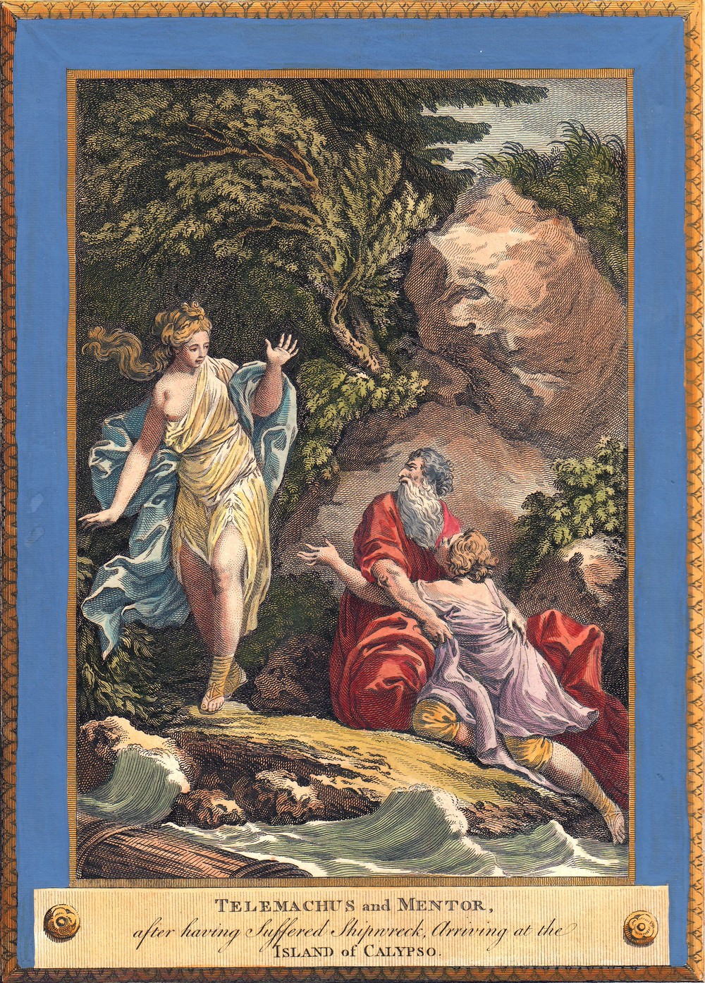 Шарь Моне. Гравюра с акварелью из книги «Приключения Телемака», 1774